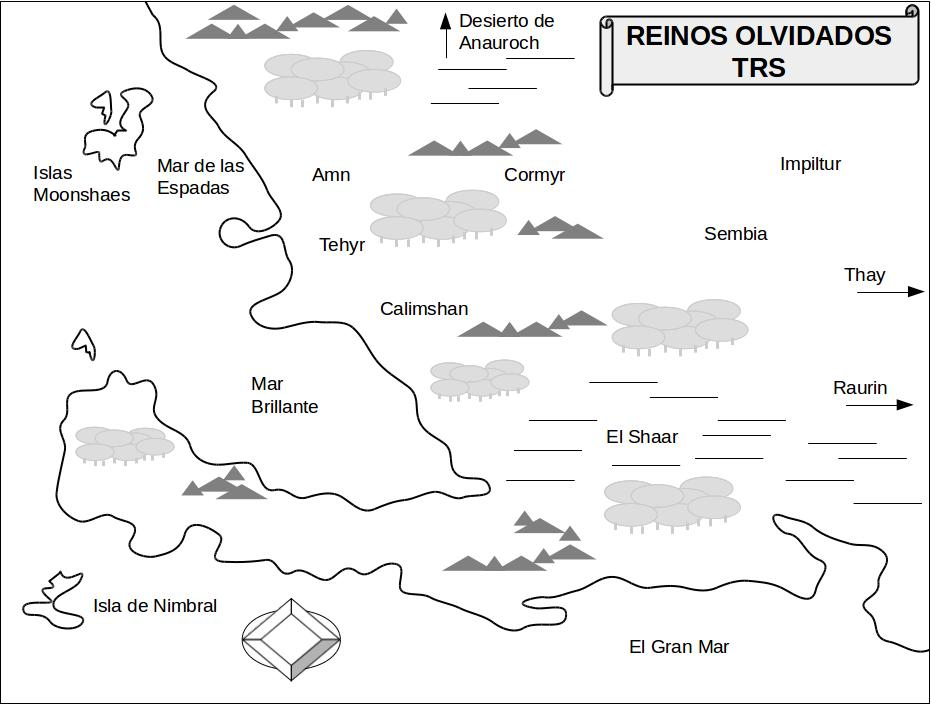 Mapa de los Reinos Olvidados, Reinos ficticios creados por TRS para diversas novelas, juegos de rol y videojuegos.